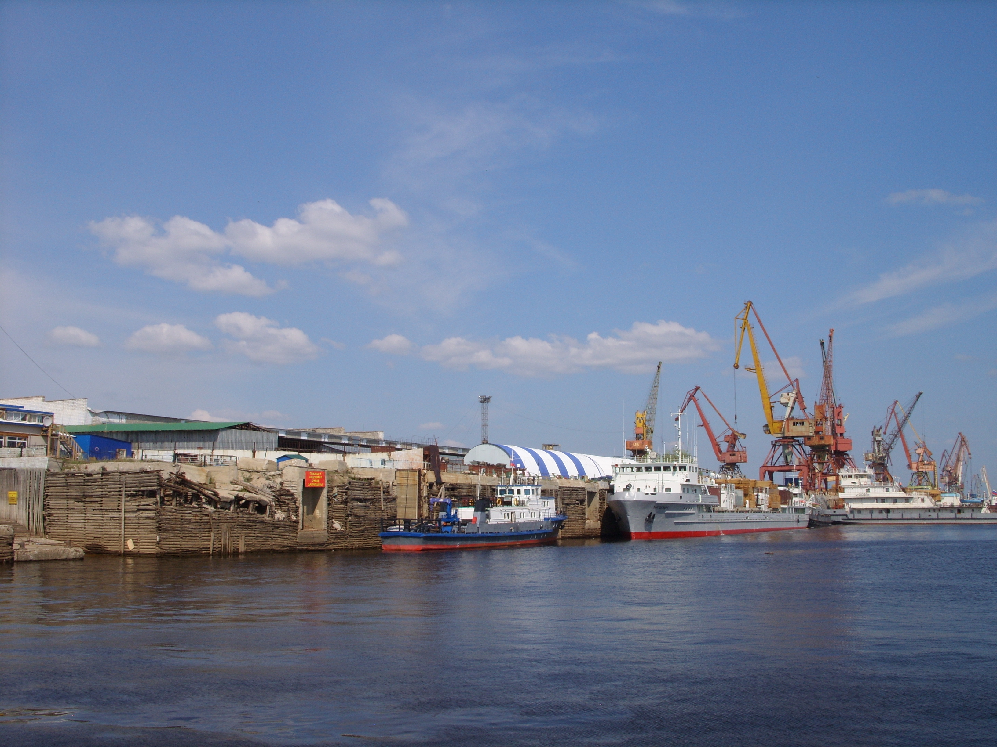 снимок 2014 г.